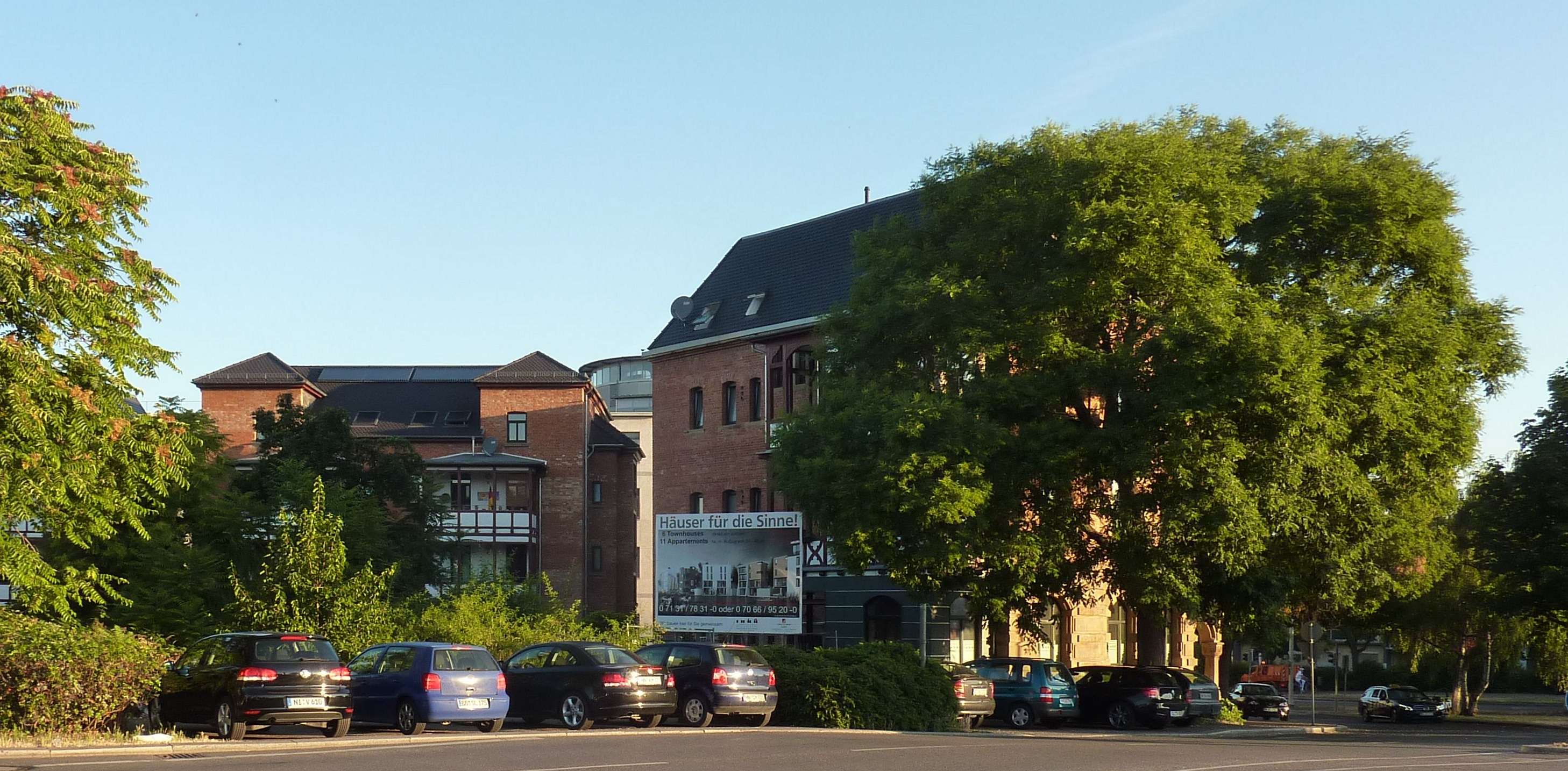 rechts Charlottenstraße 2, Heilbronn. Durch die Baulücke Blick auf Rückfronten der Sontheimer Str.